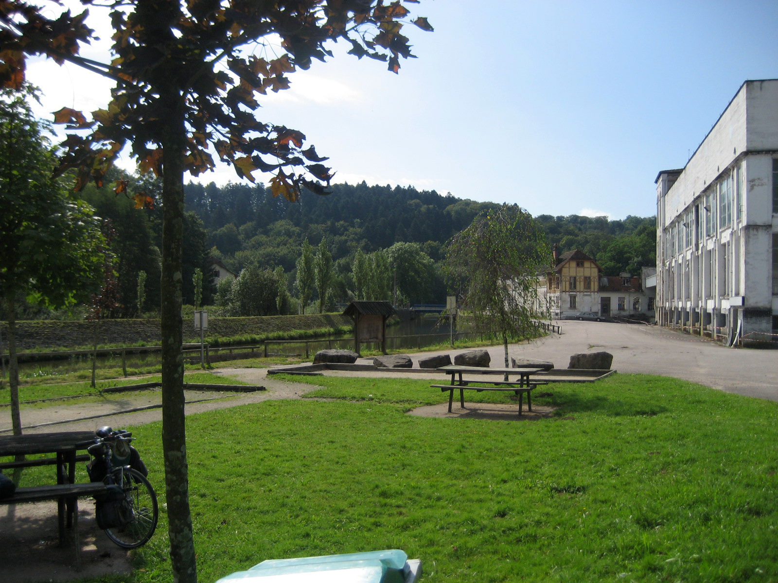 Canal des Vosges, Thunimont, département des Vosges, France